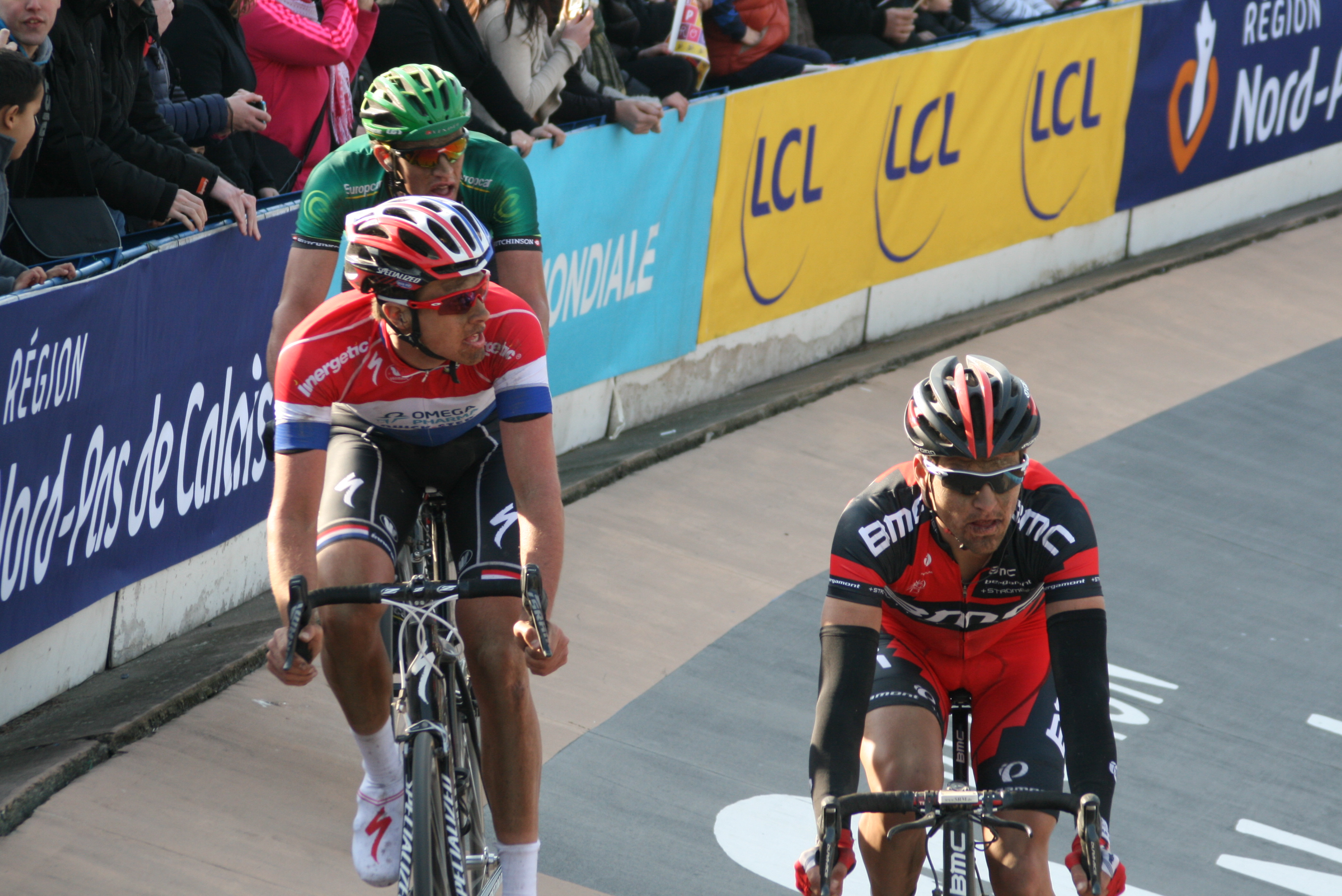 Paris-Roubaix 2013, vélodrome de Roubaix Damien Gaudin, Niki Terpstra, Greg Van Avermaet